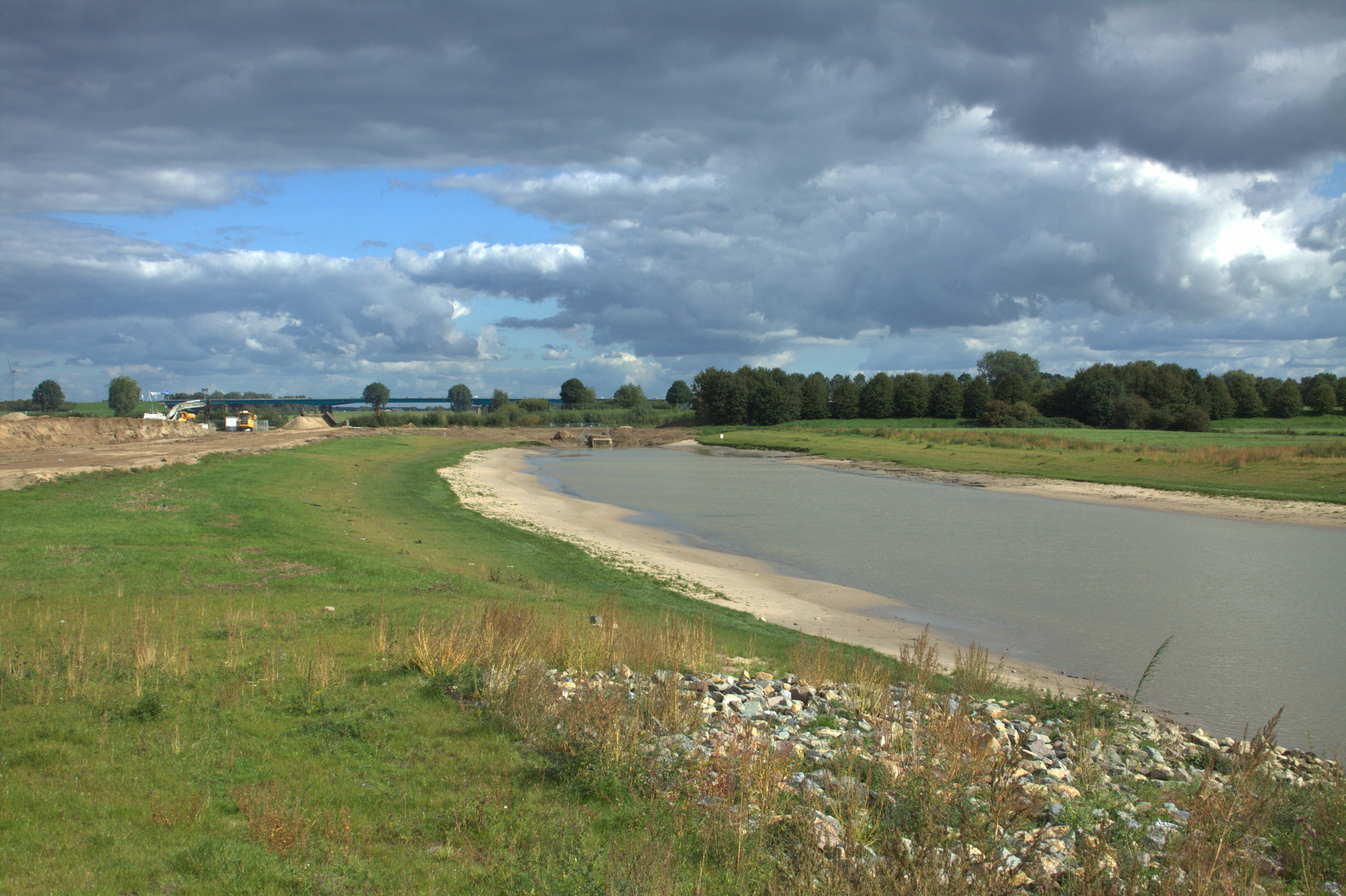 De Nevengeul gegraven in het kader van ruimte voor de rivier de Lek bij Vianen.